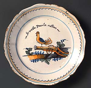 Coq gaulois